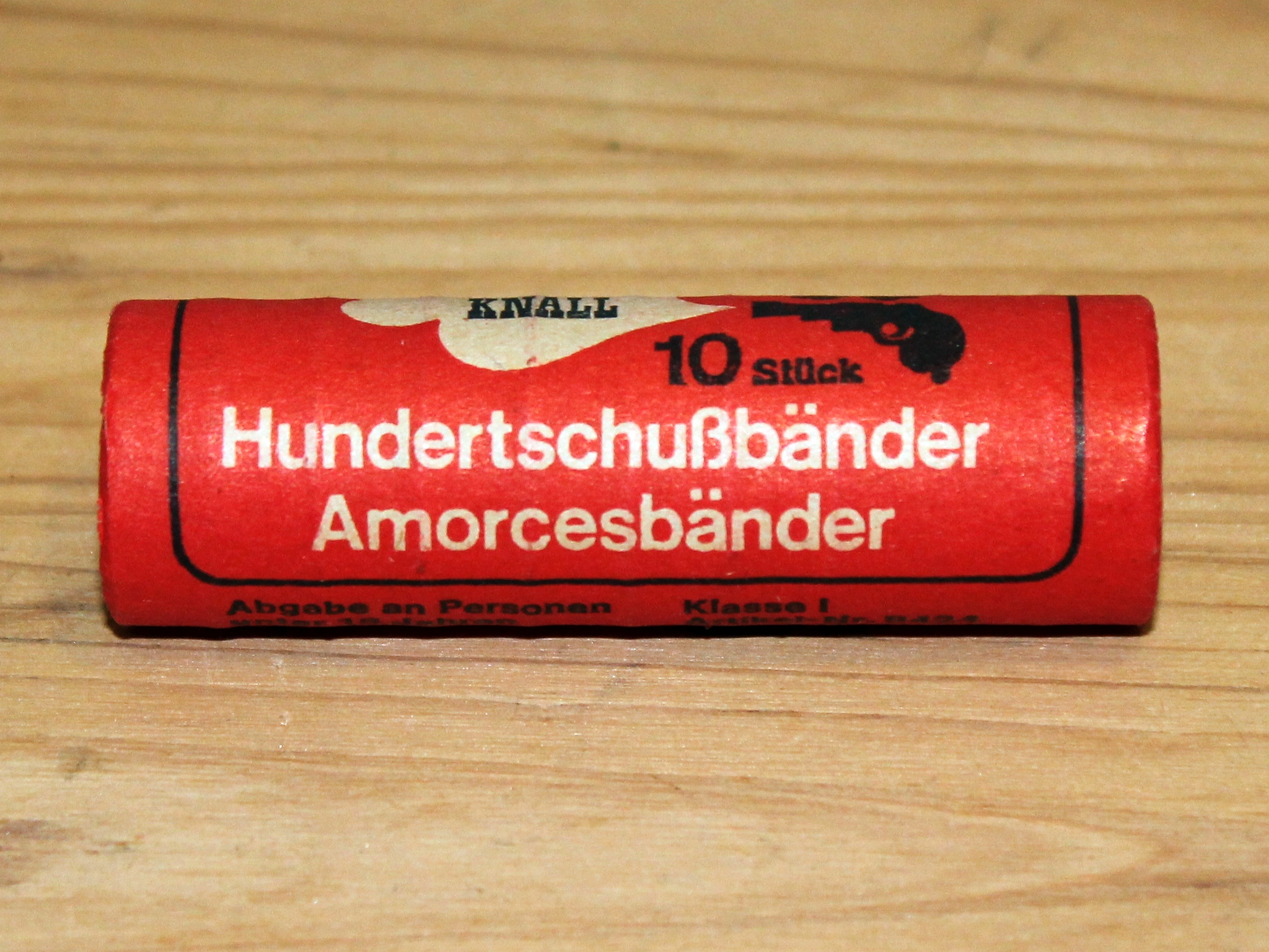 Eine Rolle Zündplättchen.